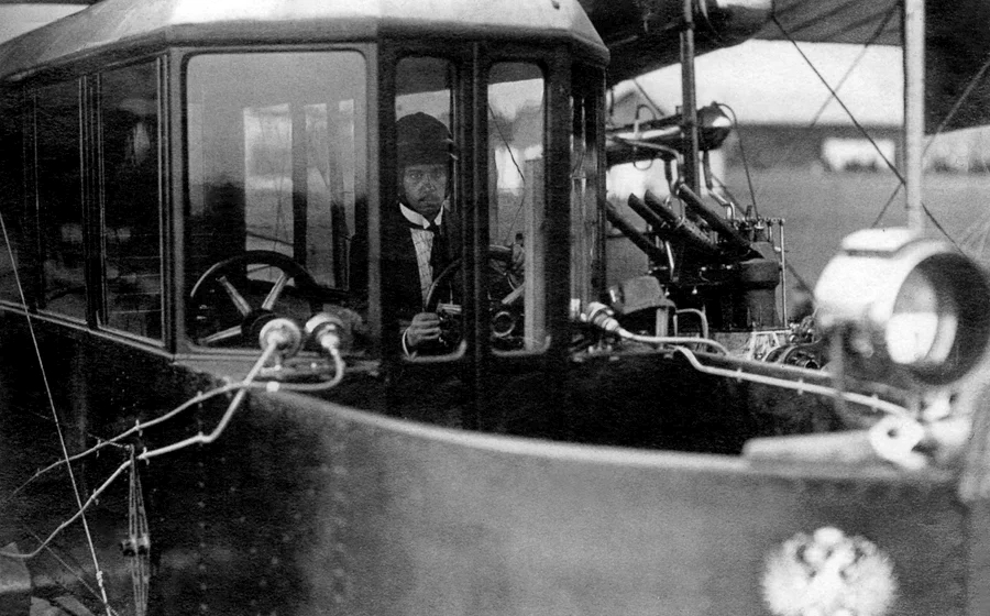 Игорь Сикорский за штурвалом «Русского витязя»